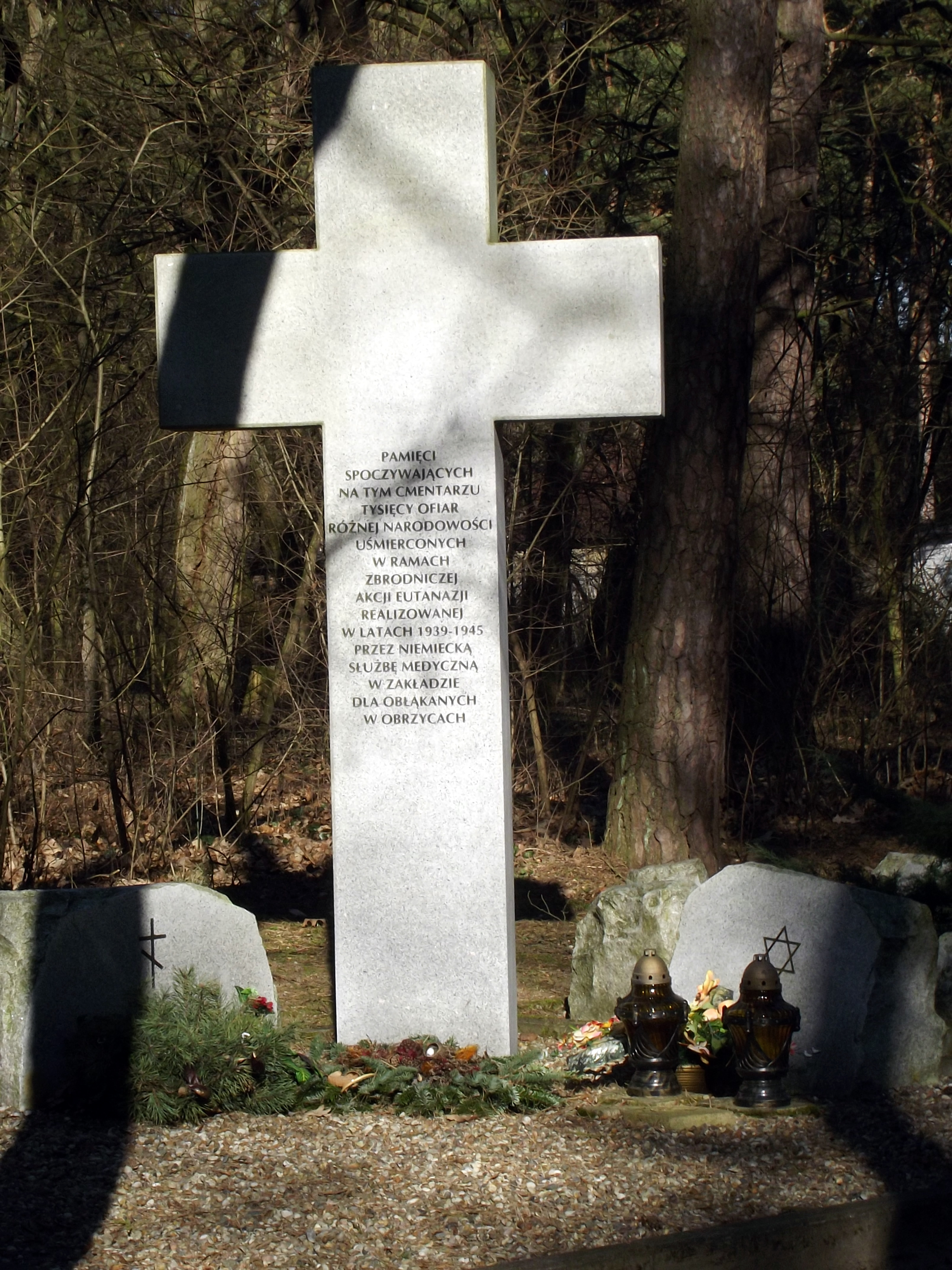 Pomnik ofiar w Międzyrzeczu-Obrzycach na terenie cmentarza